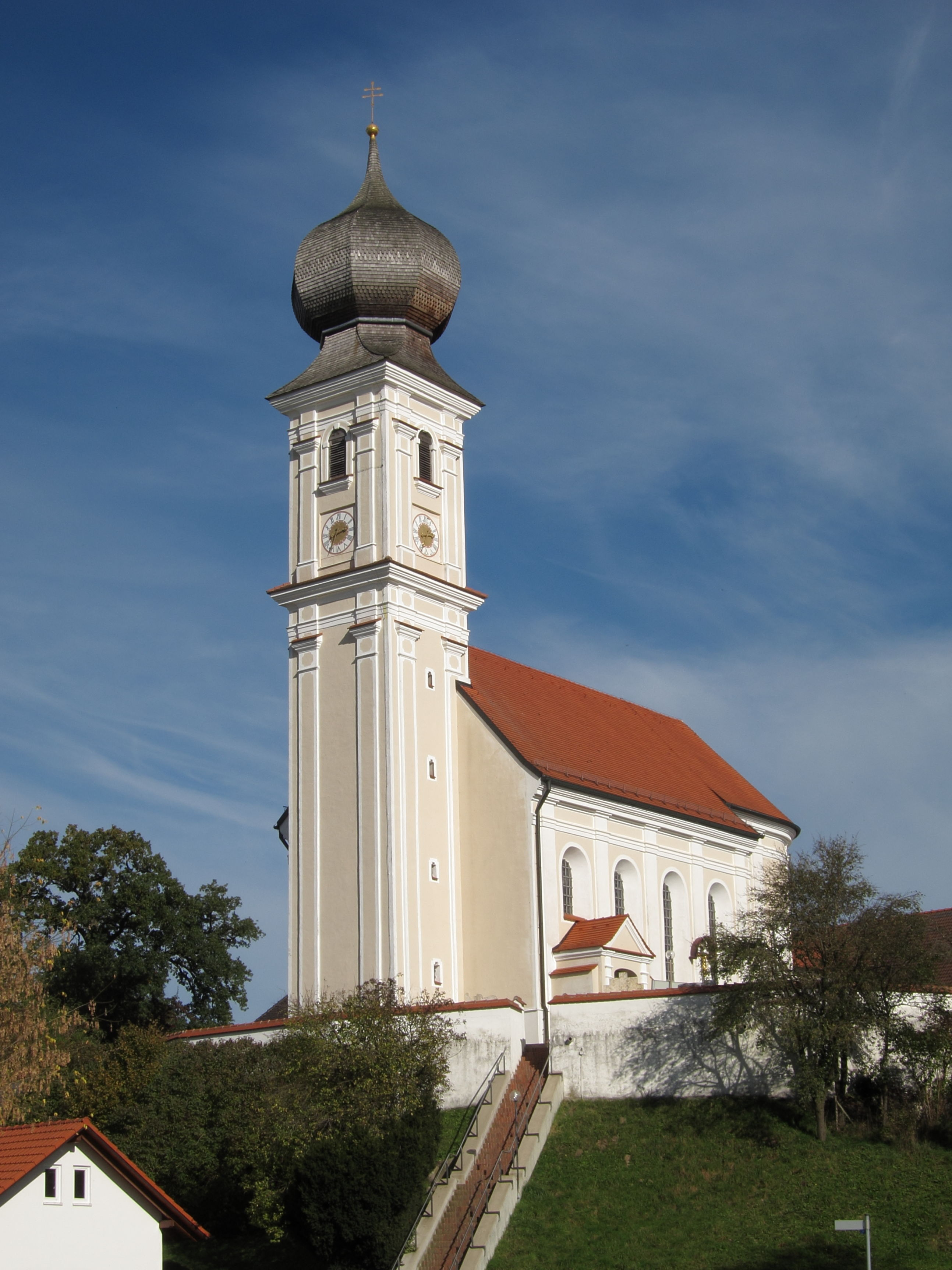 Burgharting; katholische Pfarrkirche St. Vitus, Saalbau mit eingezogenem Apsidenchor, Zwiebelturm und angefügter Sakristei, in spätbarockem Stil von Anton Kogler, 1723; mit Ausstattung.